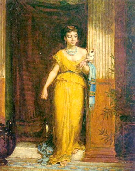 La Fileuse